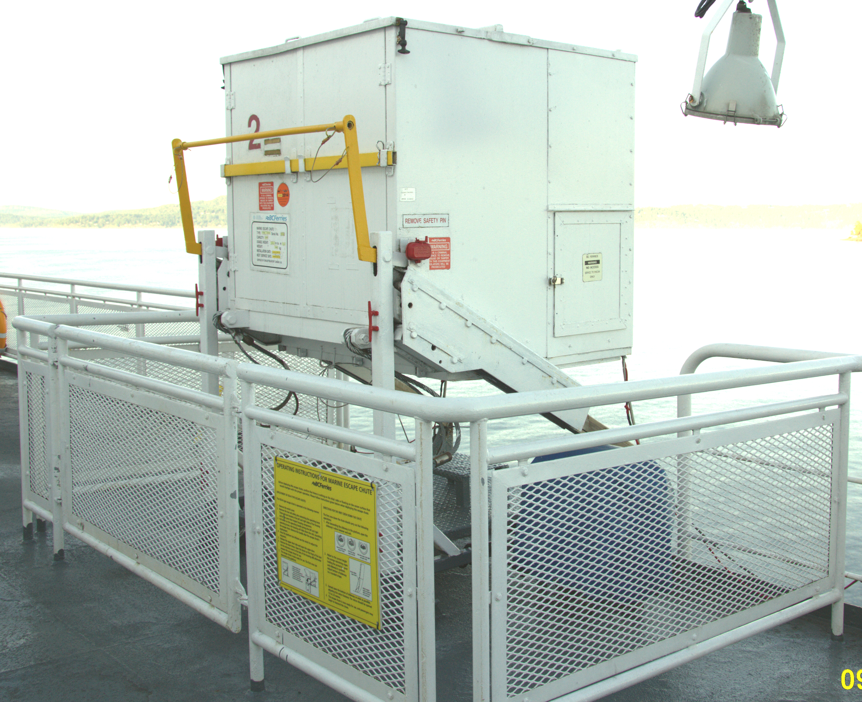 Reise der Autofähre "Spirit of Vancouver Island" zwischen Tsawwassen und Swartz Bay.